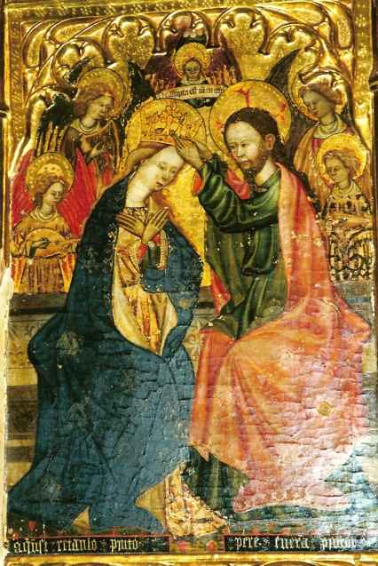 Esta es la tabla central del retablo de la Coronación de Maria de la catedral de Huesca. Se conserva en el Museo Diocesano de Huesca, y lleva la firma del pintor.